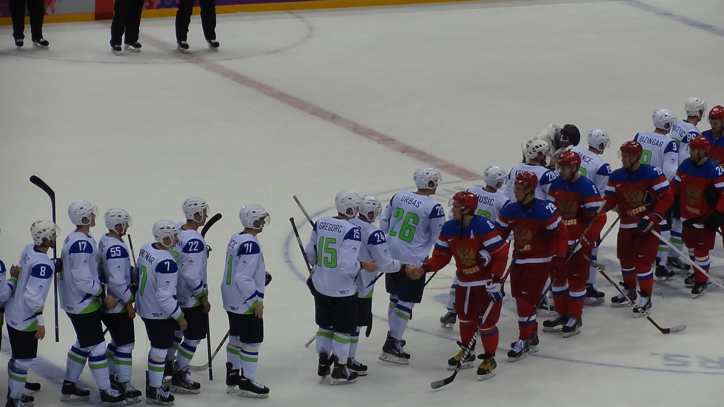 Сочи-2014. Хоккей, Россия — Словения, 5:2.